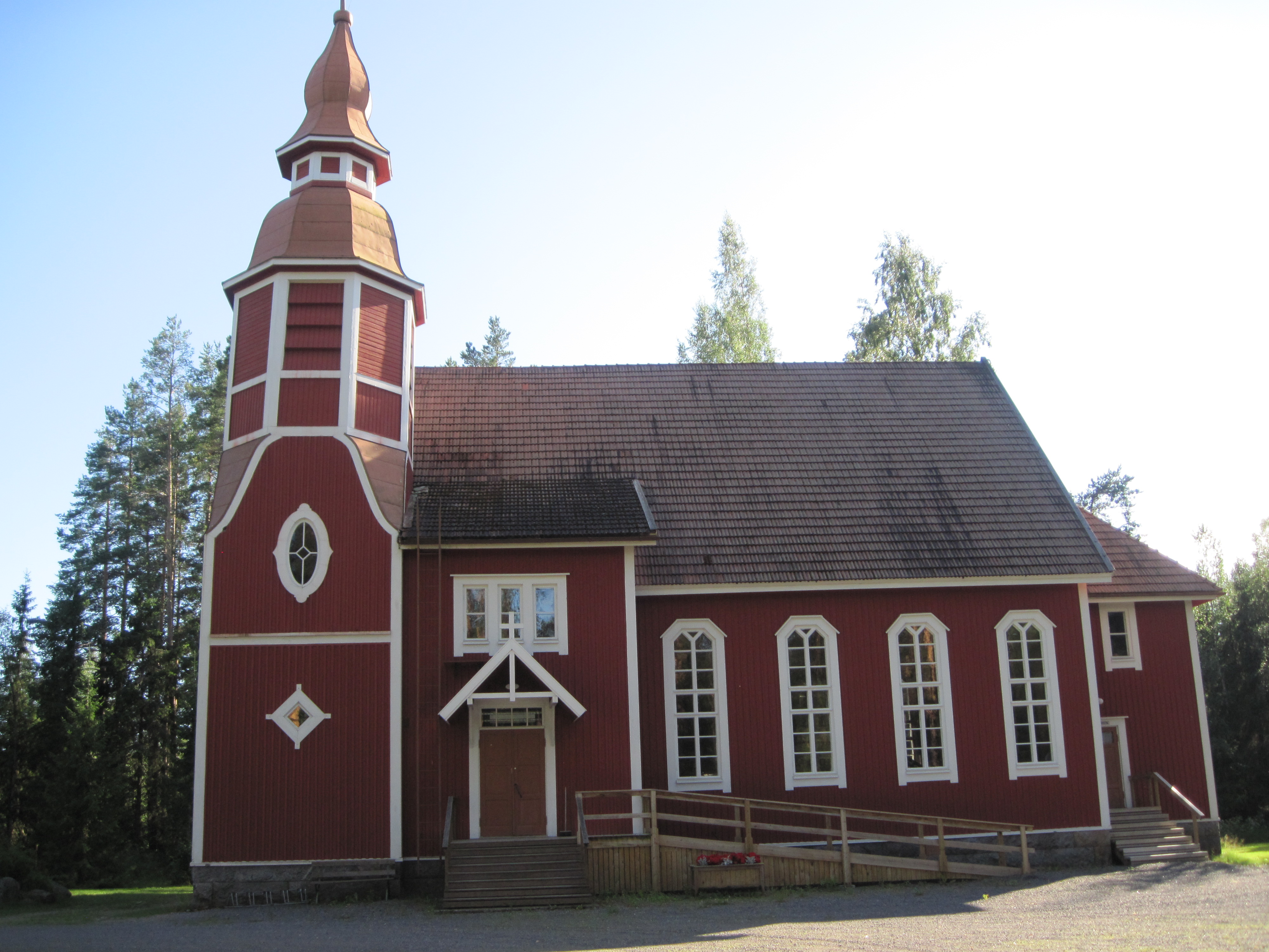 Killikosken kirkko kesällä 2012